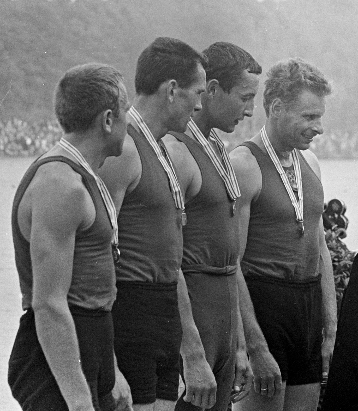 Europese Roeikampioenschappen te Duisburg, Russische vier zonder stuurman. ID from [1] [2] [3]